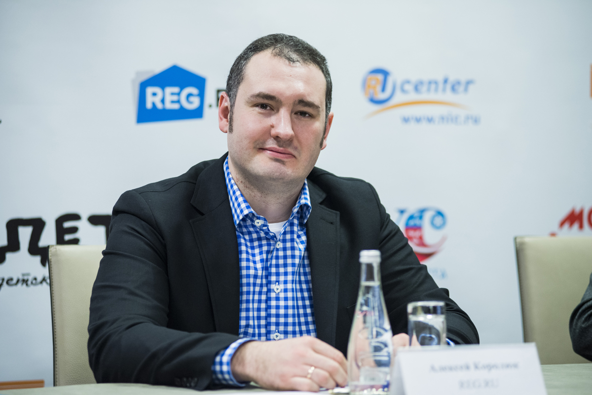 Глава компании Reg.ru Алексей Королюк